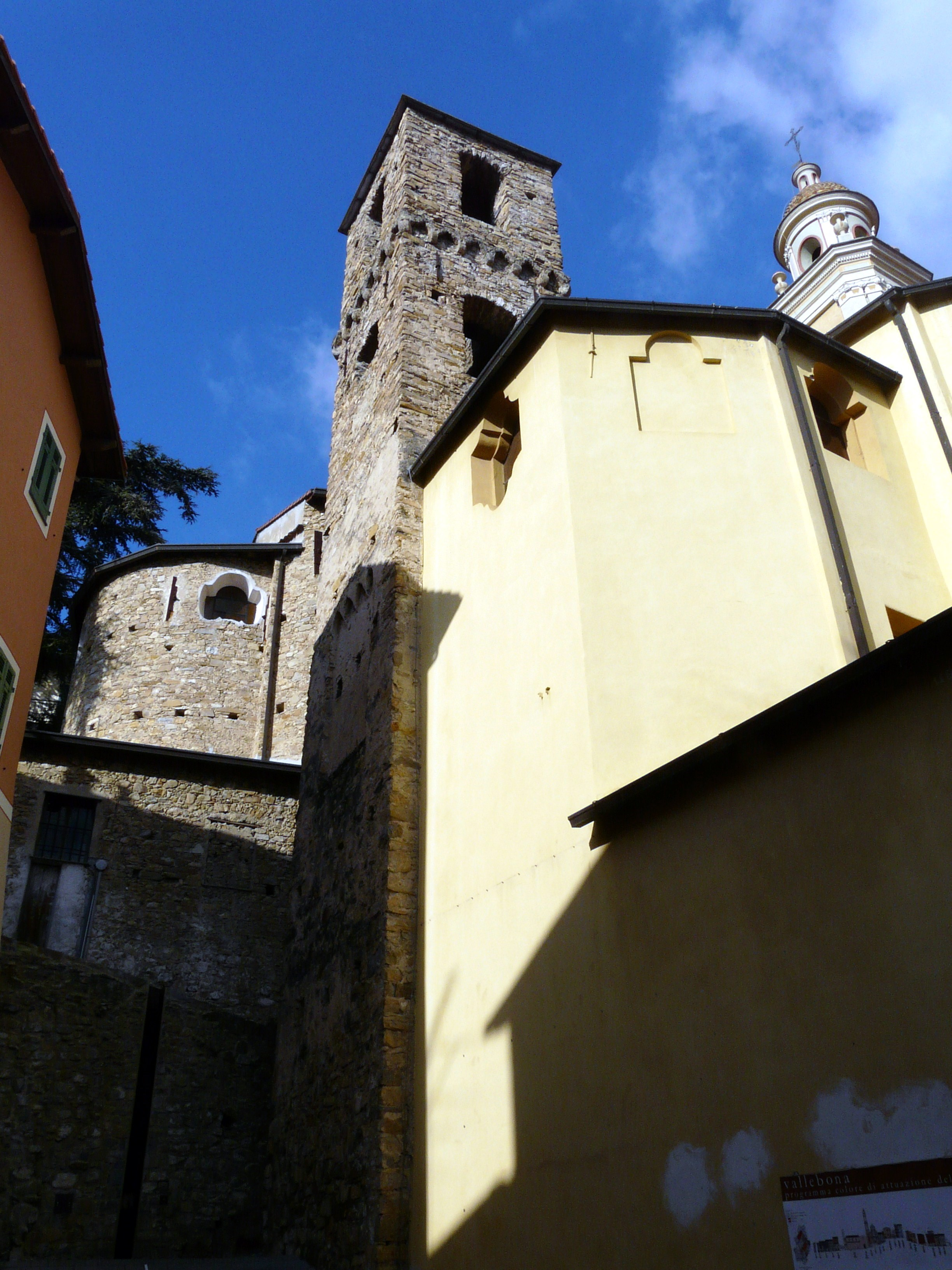 Chiesa di San Lorenzo, Vallebona, Liguria, Italia